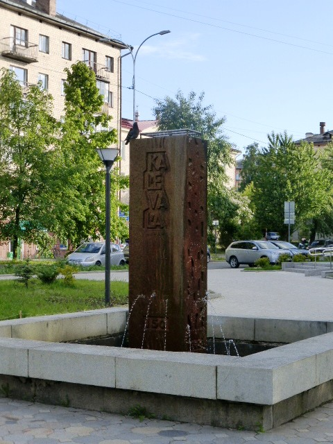 Фонтан в честь 150-летия первого издания карело-финского эпоса "Калевала". Установлен в Петрозаводске в сквере имени Элиаса Лённрота (перекрёсток улиц Кирова и Свердлова). Скульптор Лео Ланкинен